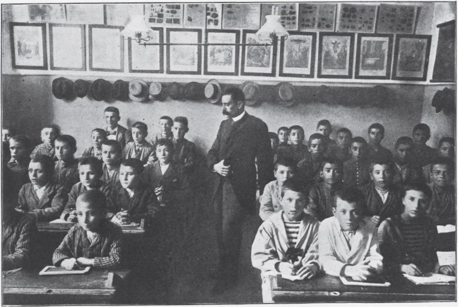 Σχολή απόρων παίδων συλλόγου παρνασσού